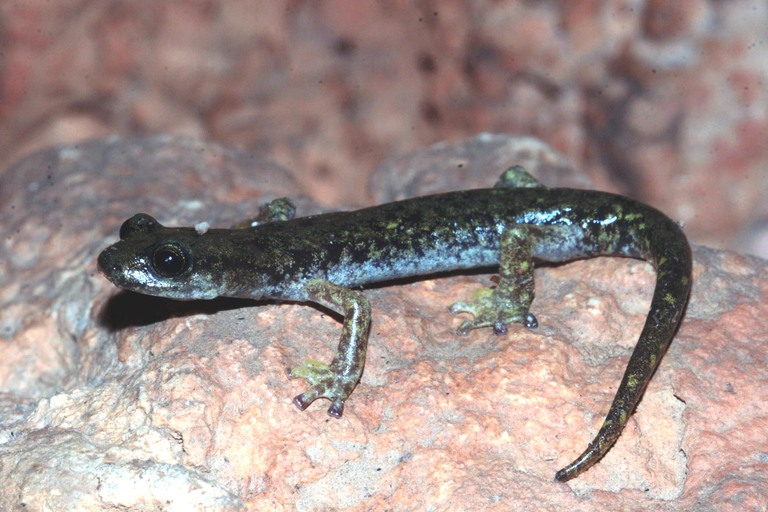 Speleomantes supramontis